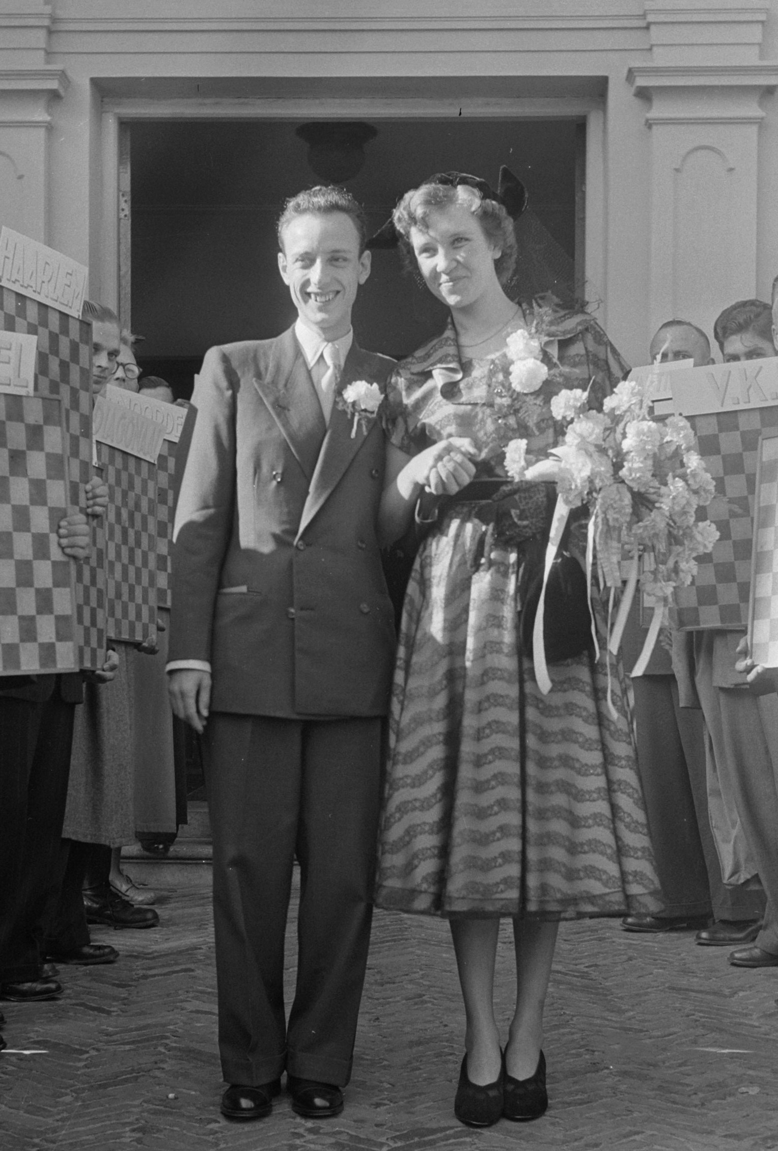 Huwelijk Roozenburg (wereldkampioen dammen) rechts Keller